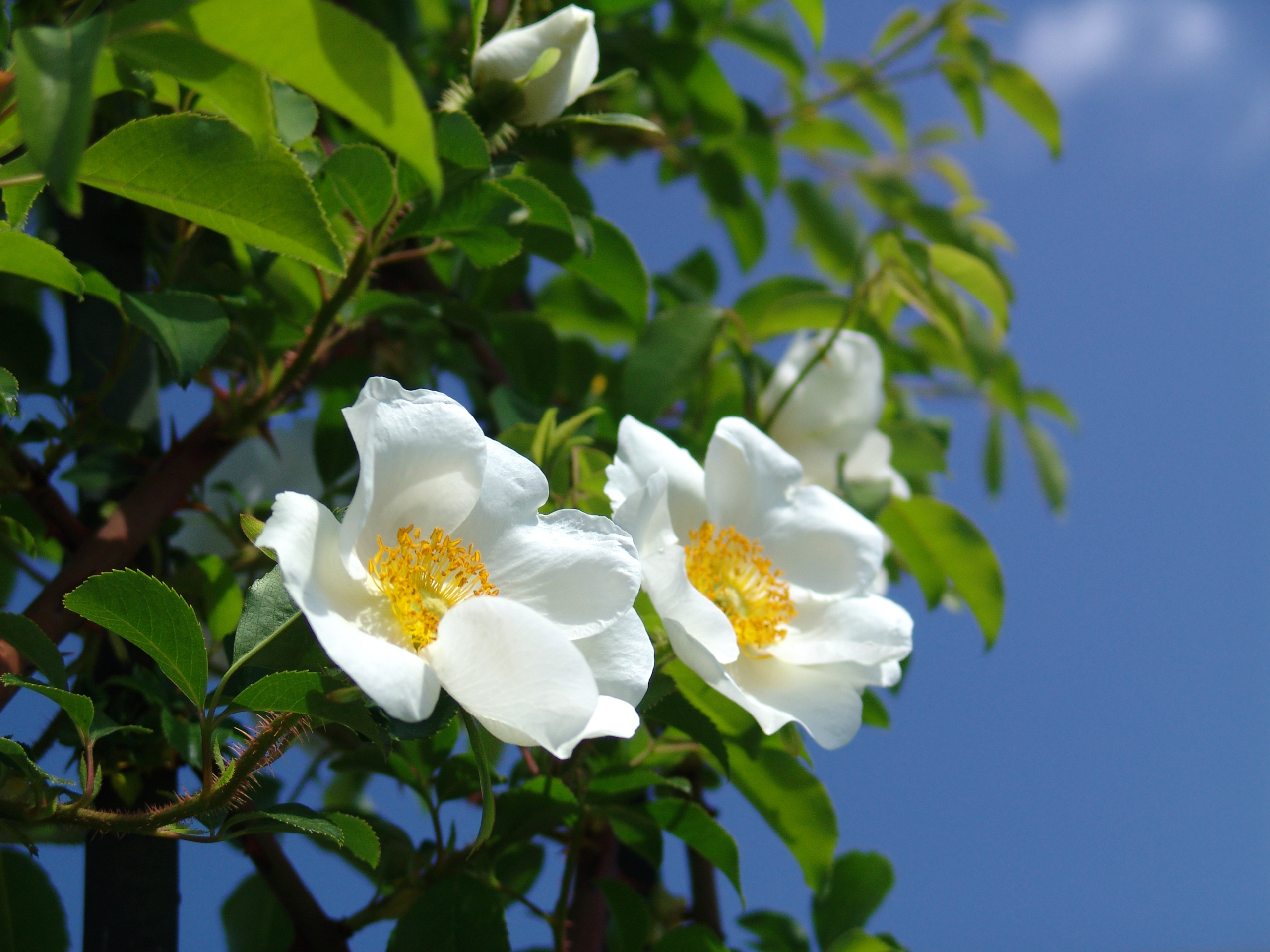 Rose Rosa laevigata バラ ナニワイバラ Species rose 原種 China 中国中南部原産 1759